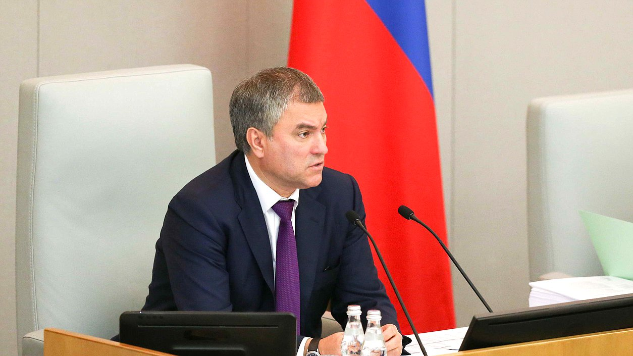 Vyacheslav Volodin on the place of the Chairman of the state Duma.